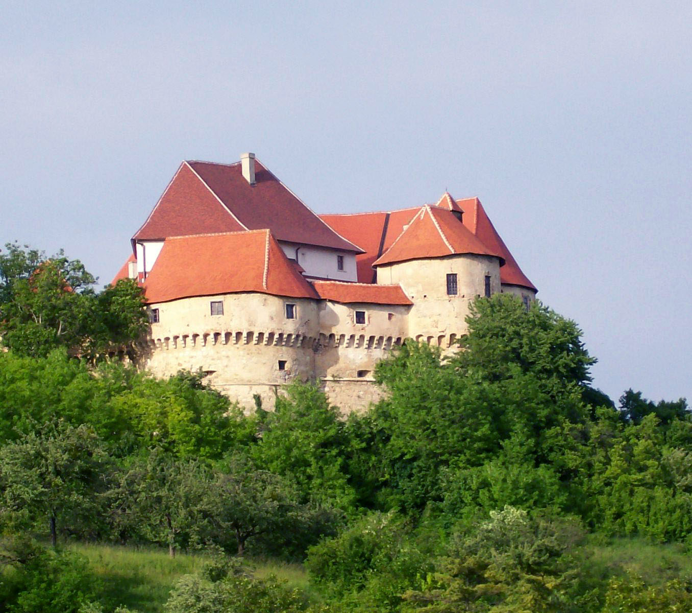 Veliki Tabor